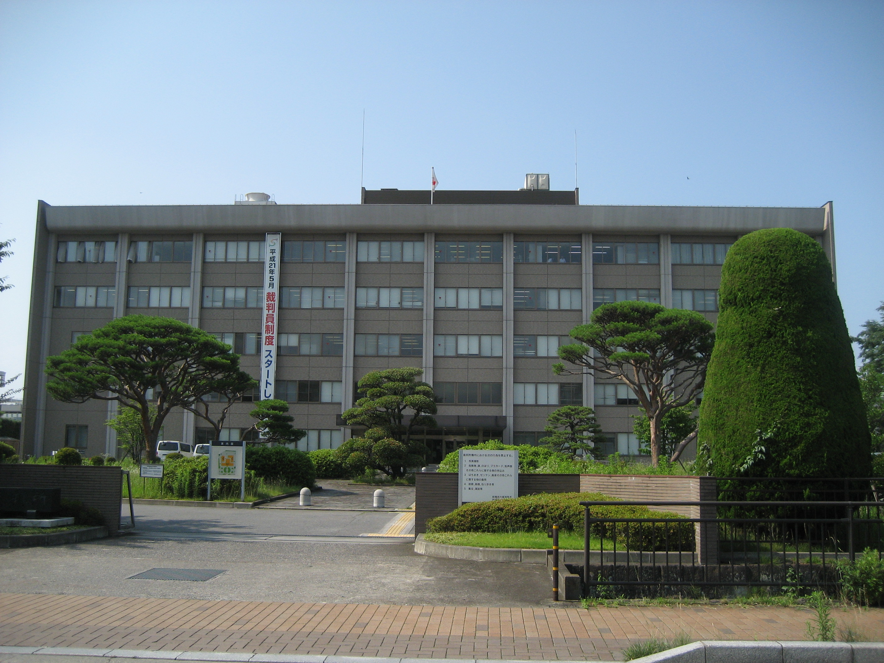 前橋地方裁判所庁舎